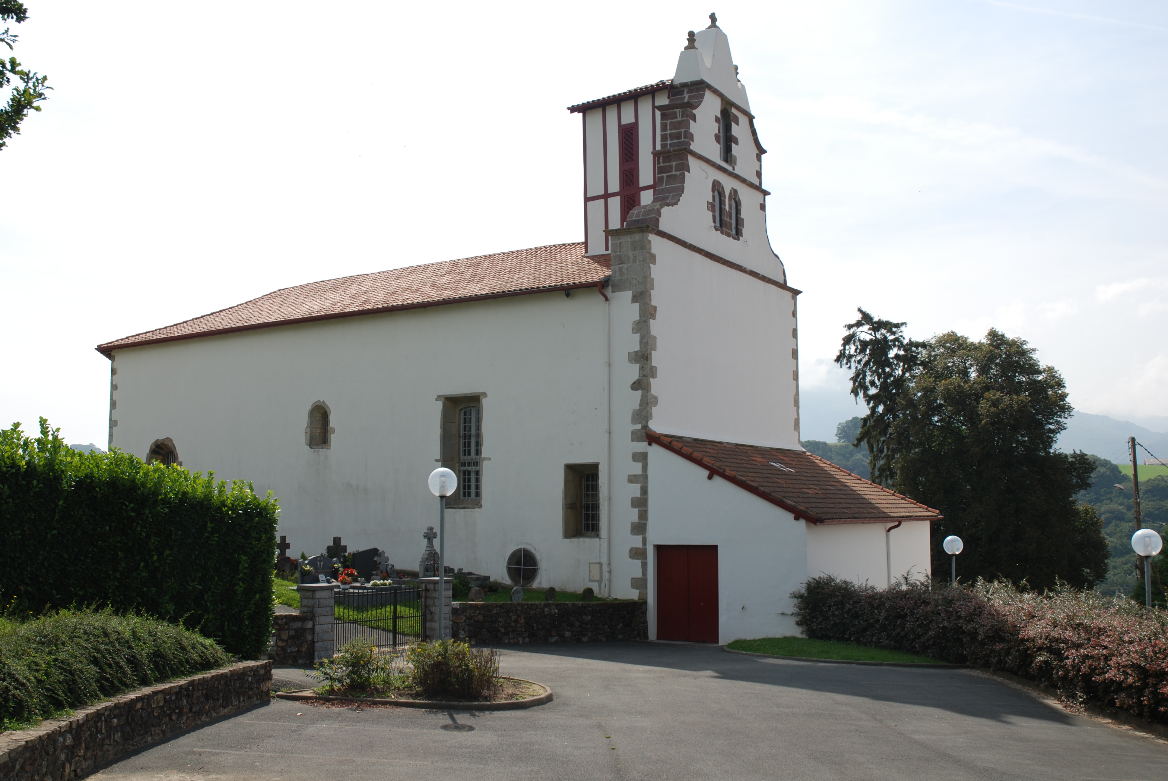 Macaye, l'église